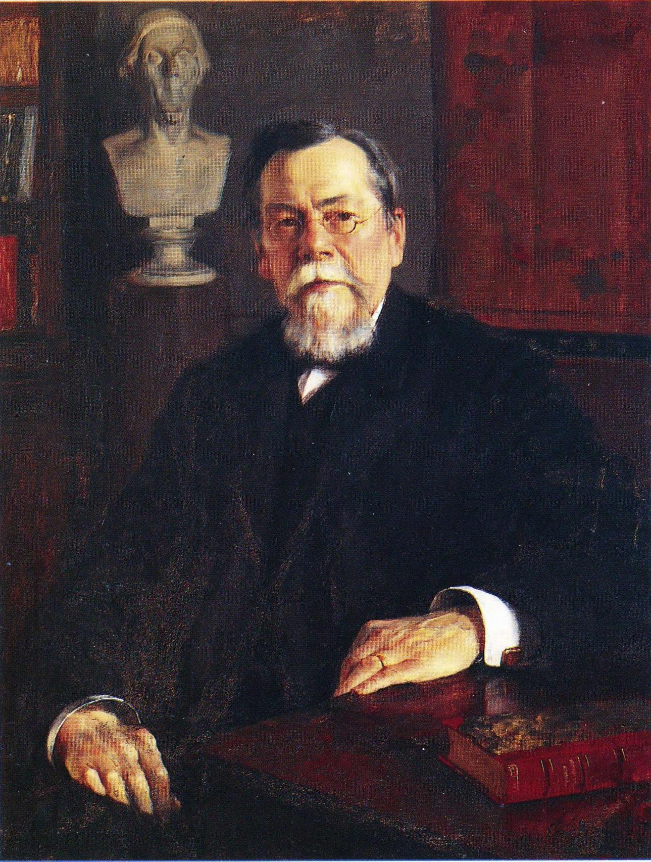 Professori August Ahlqvist (1826–1889), taustalla Elias Lönnrotin rintakuva. Muotokuvan omistaa Helsingin yliopiston Savolainen osakunta.